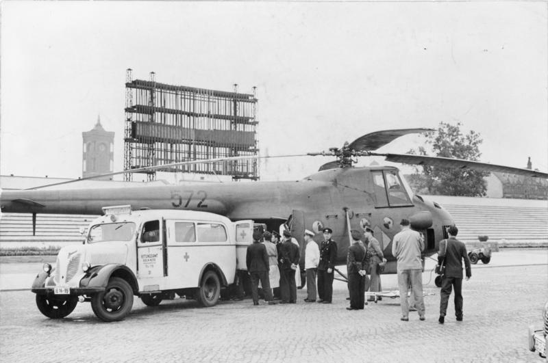 Zentralbild/Krueger 1.8.1959 Hubschrauber landete mit Schwerverletzten auf dem Marx-Engels-Platz Ein Hubschrauber der Nationalen Volksarmee landete in den Morgenstunden des 1.8.1959 auf dem Marx-Engels-Platz in Berlin und brachte einen Schwerverletzten aus Rathenow. Ein Krankenwagen, der von Funkwagen und Feuerwehr begleitet wurde, übernahm den Transport des Verletzten in die Charite. UBz.: Der Krankenwagen ist an den Hubschrauber herangefahren, um den Verletzten einzuladen.